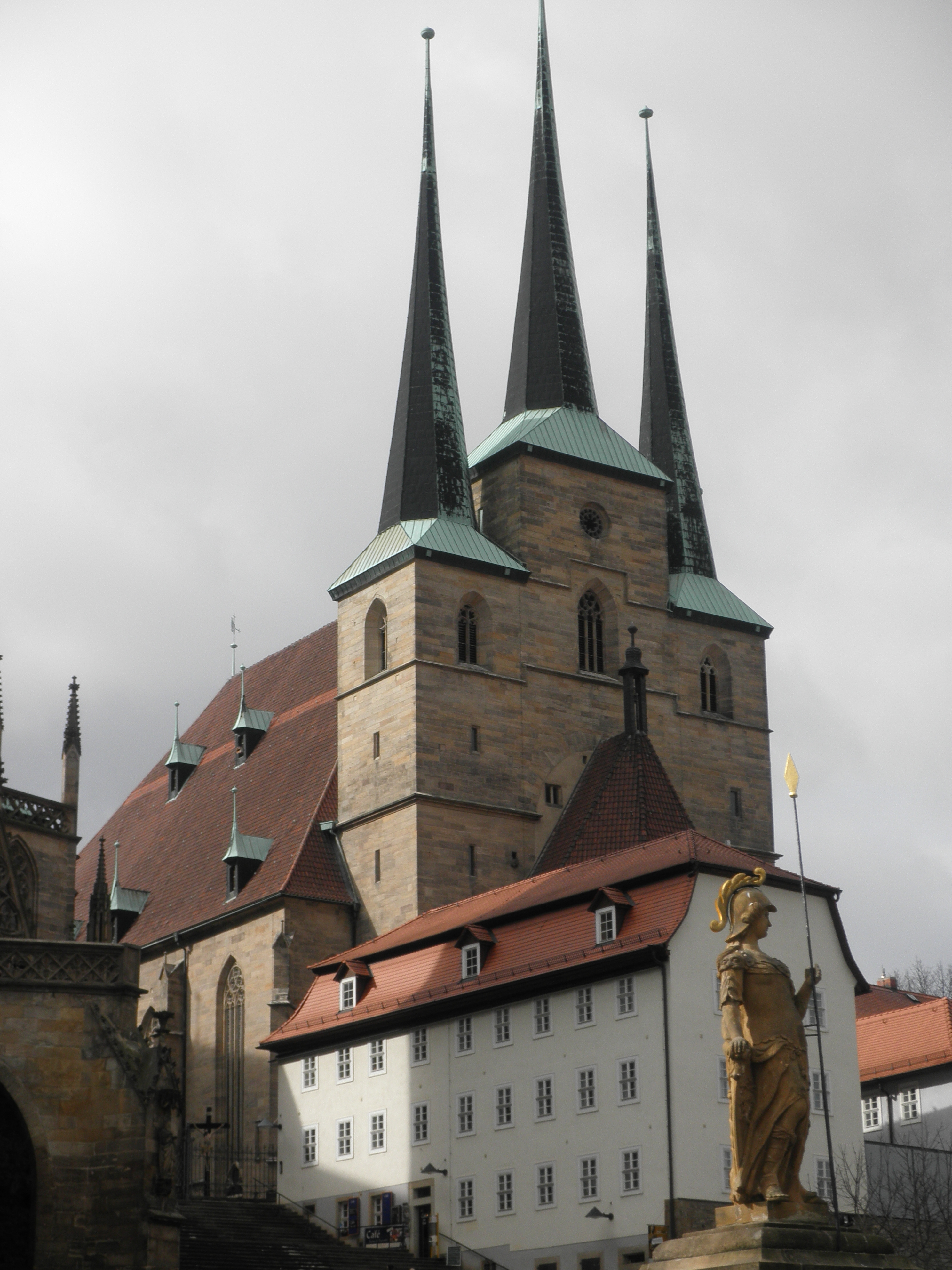 Severikirche